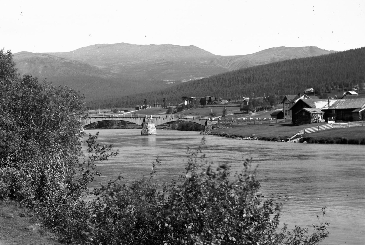 Steibrua over Glåma i Alvdal, taubanestasjonen i bakgrunnen